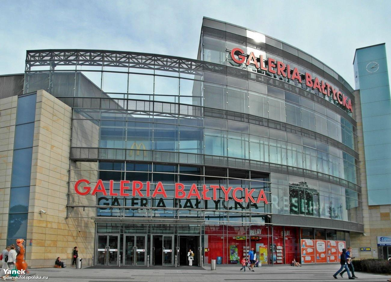 Główne wejście do budynku od strony ul. Kościuszki.